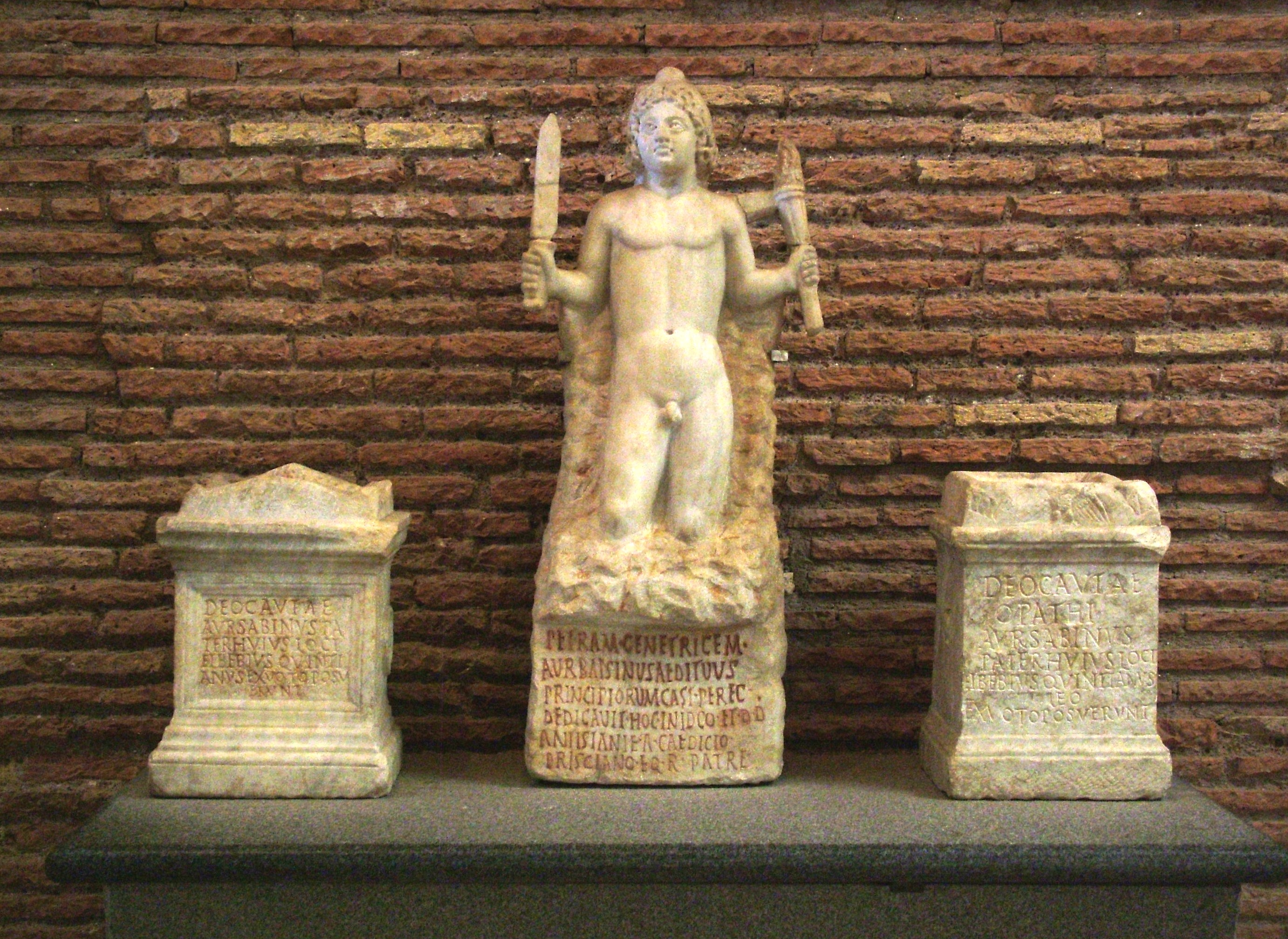 Etruszk szoborcsoport (Etruszk Nemzeti Múzeum, Róma)